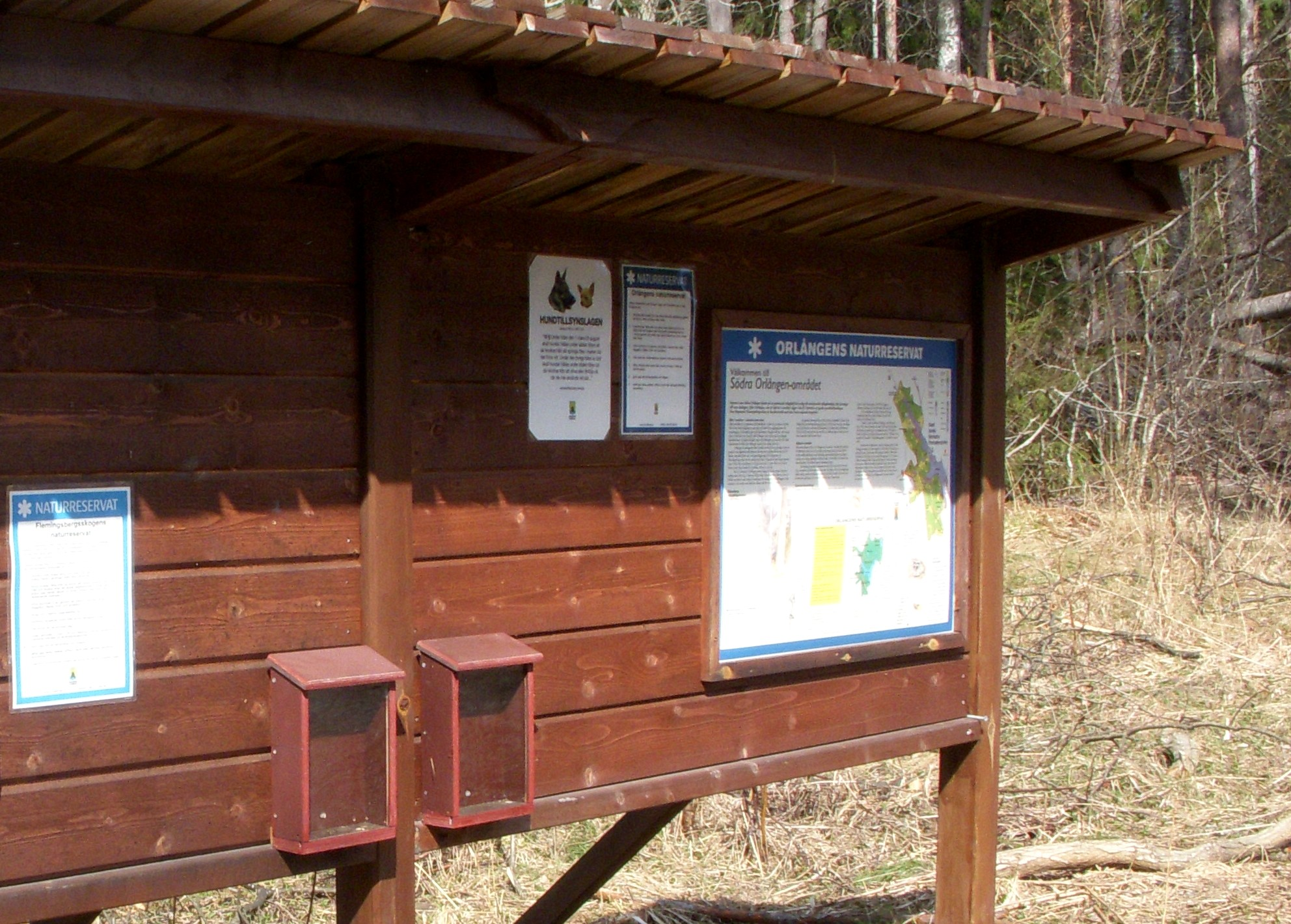 Gladöskogen, informationstavla